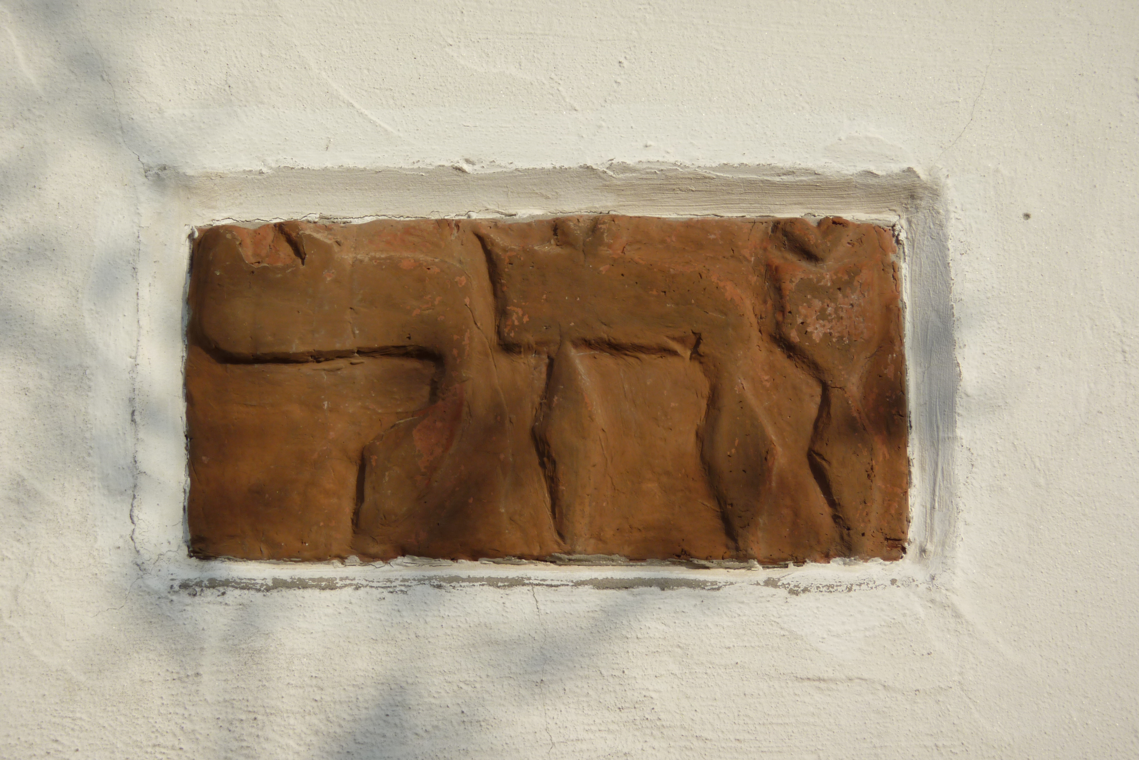 ehemalige Synagoge in Lauingen (Donau): hebräische Inschrift